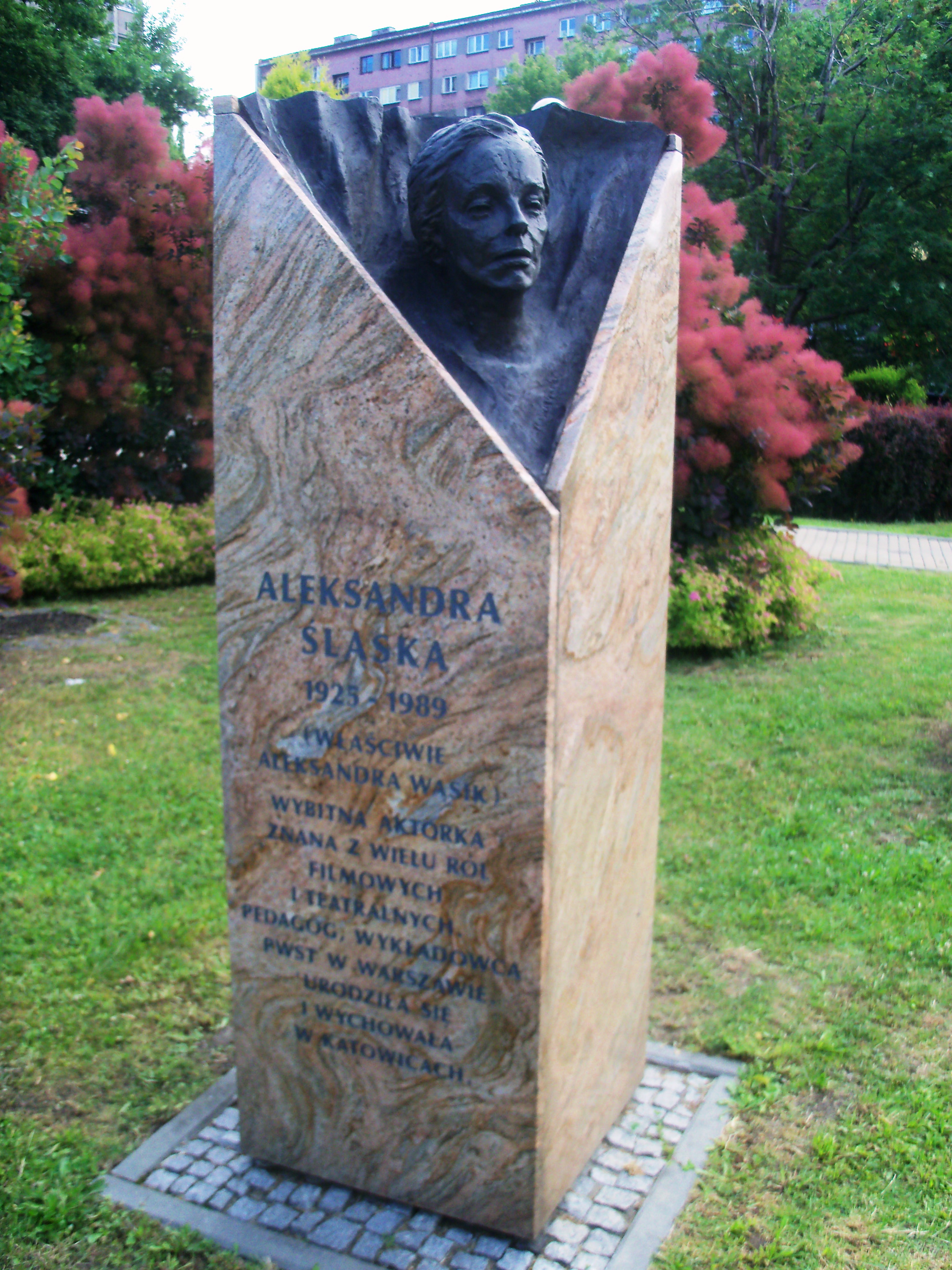 Galeria Artystyczna na placu Grunwaldzkim w Katowicach: Rzeźba przedstawiająca Aleksandrę Śląską